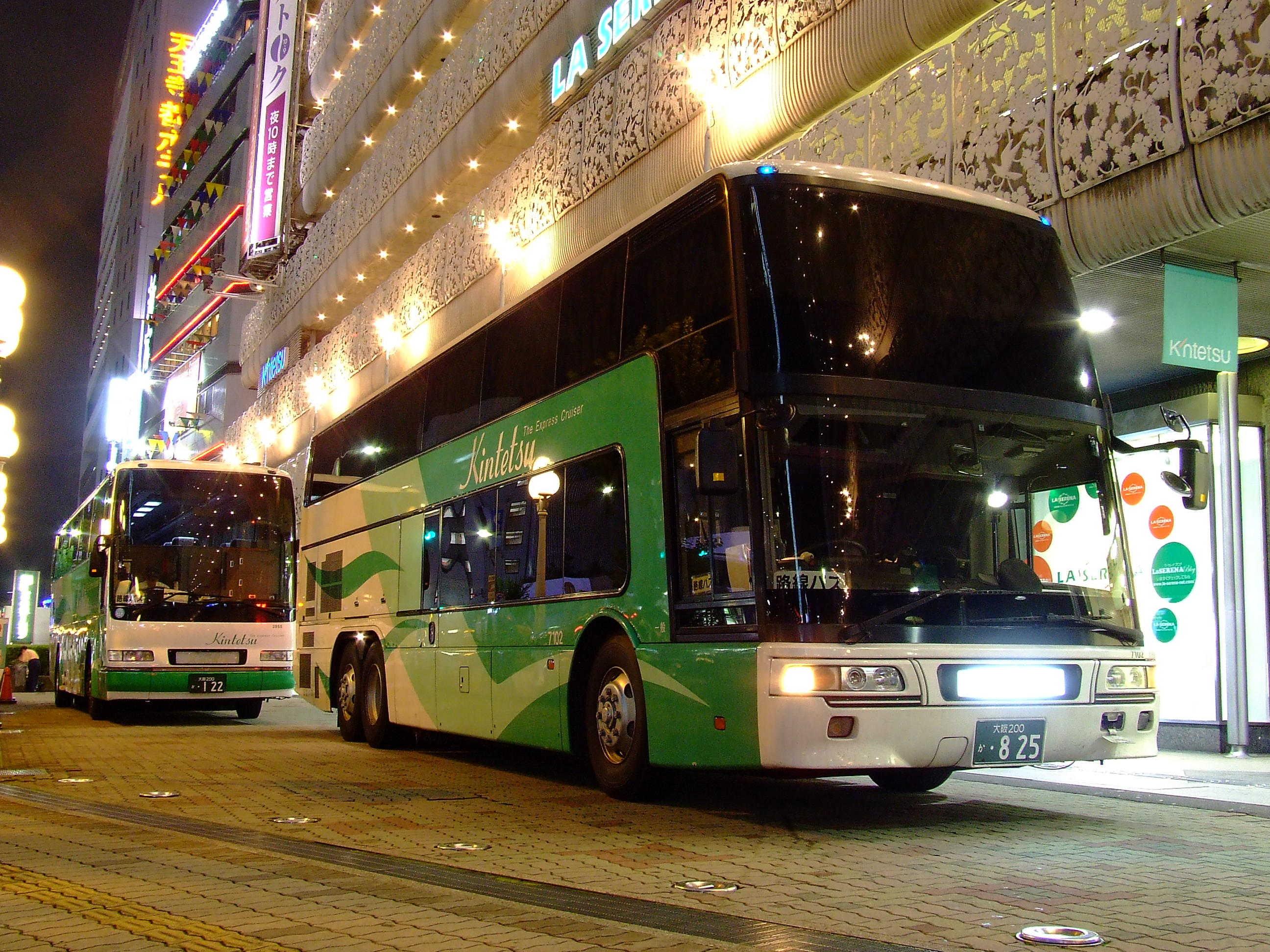 近鉄バスの高速バス車両（ふそうエアロキングと日野セレガ） 大阪あべの橋にて